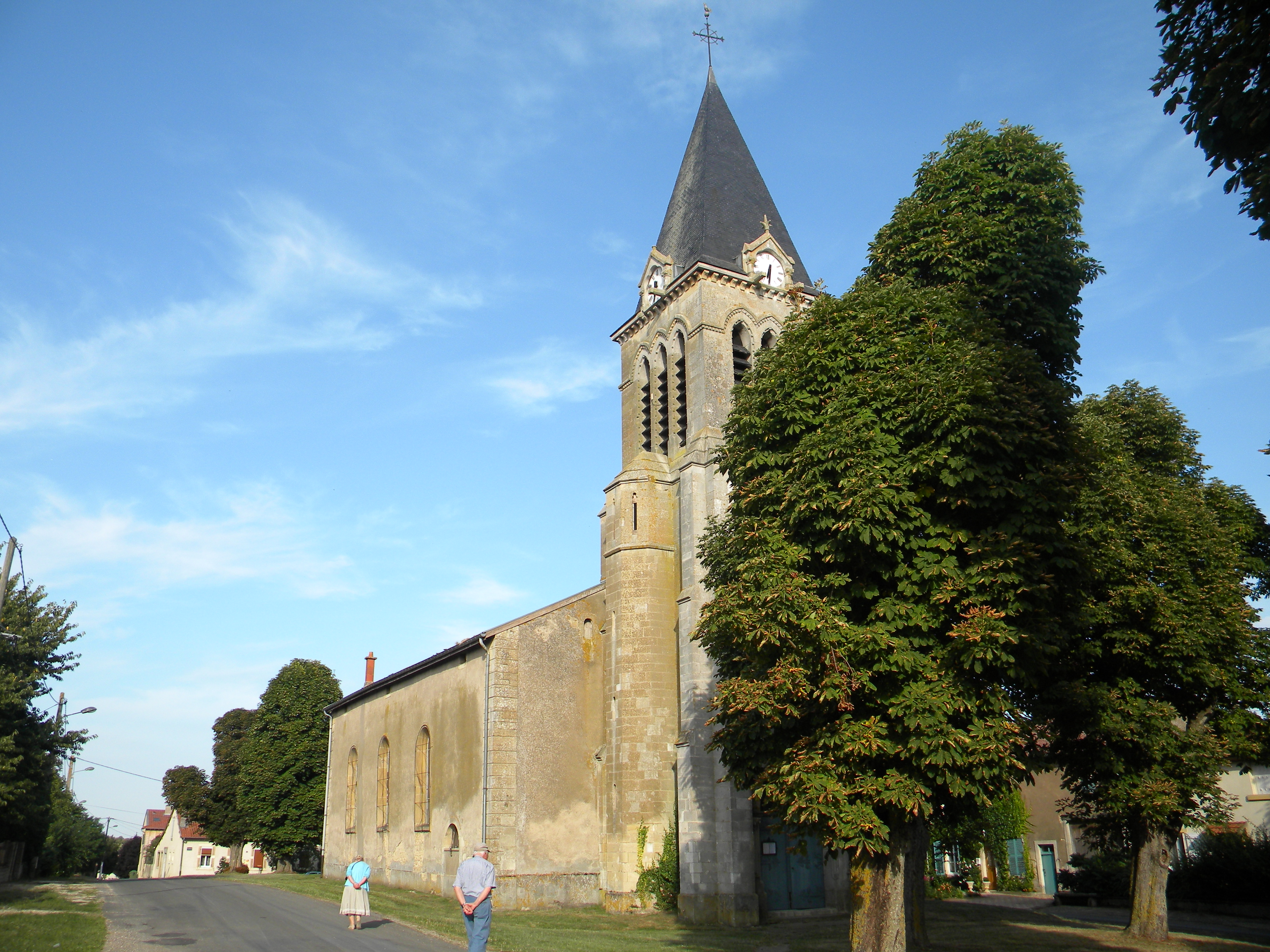 Eglise